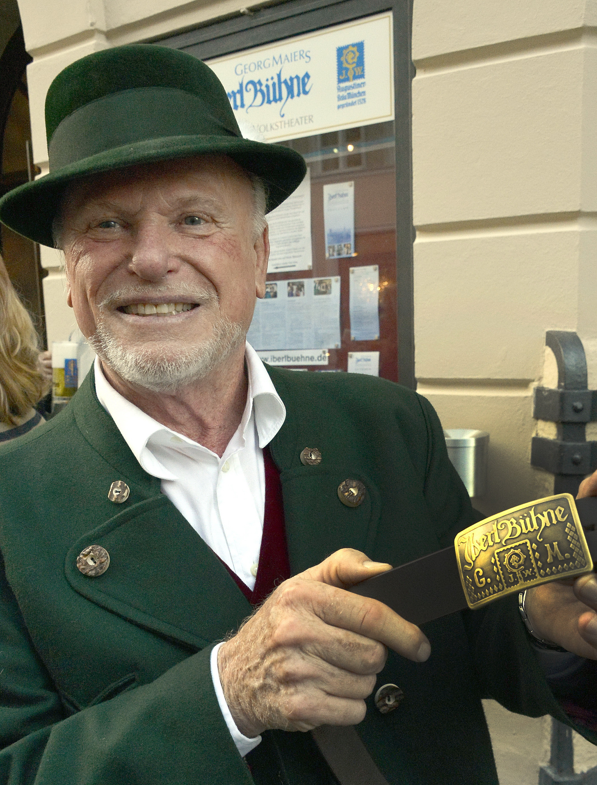 Georg Maier, vor seinem neuen Spielort